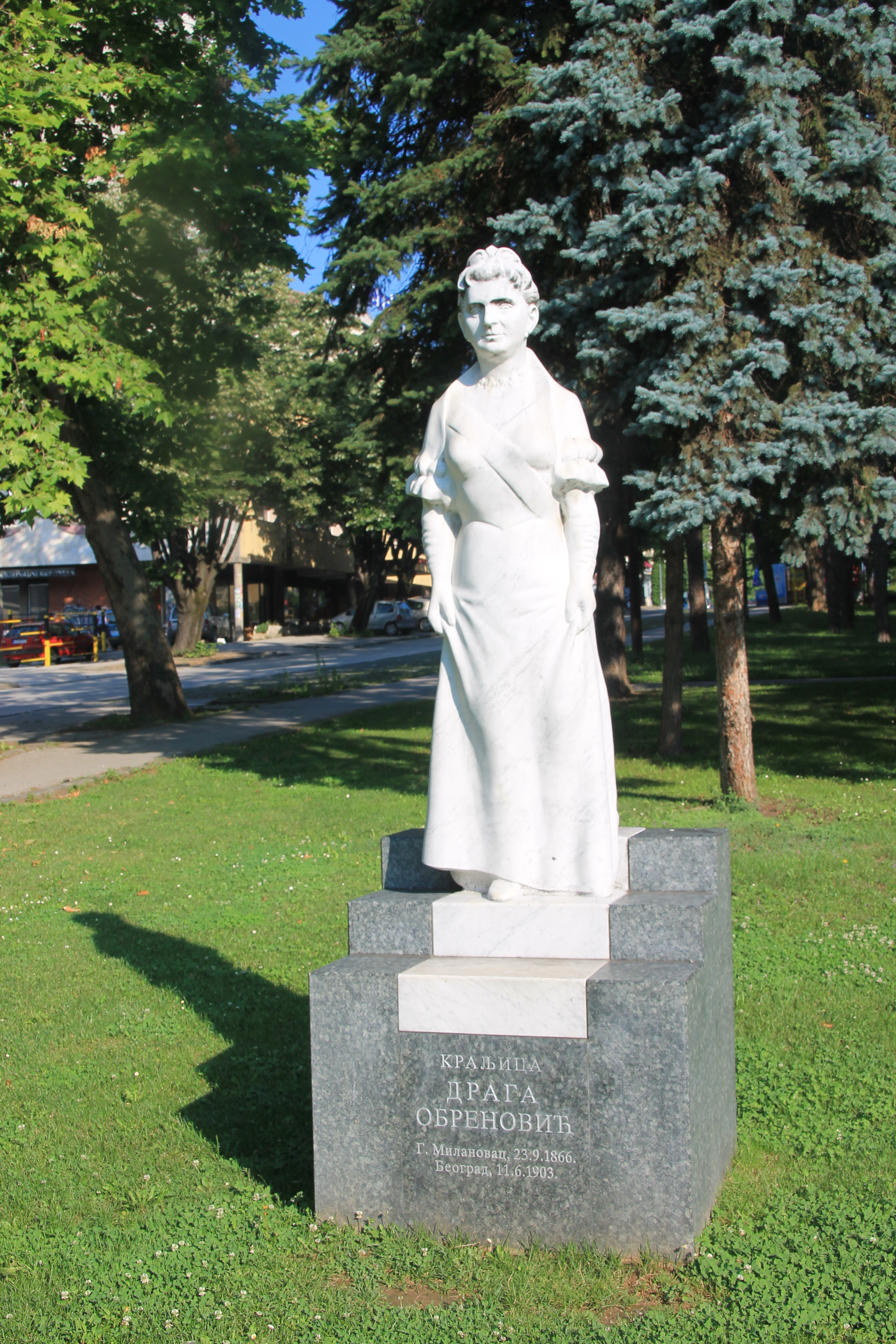 Gornji Milanovac